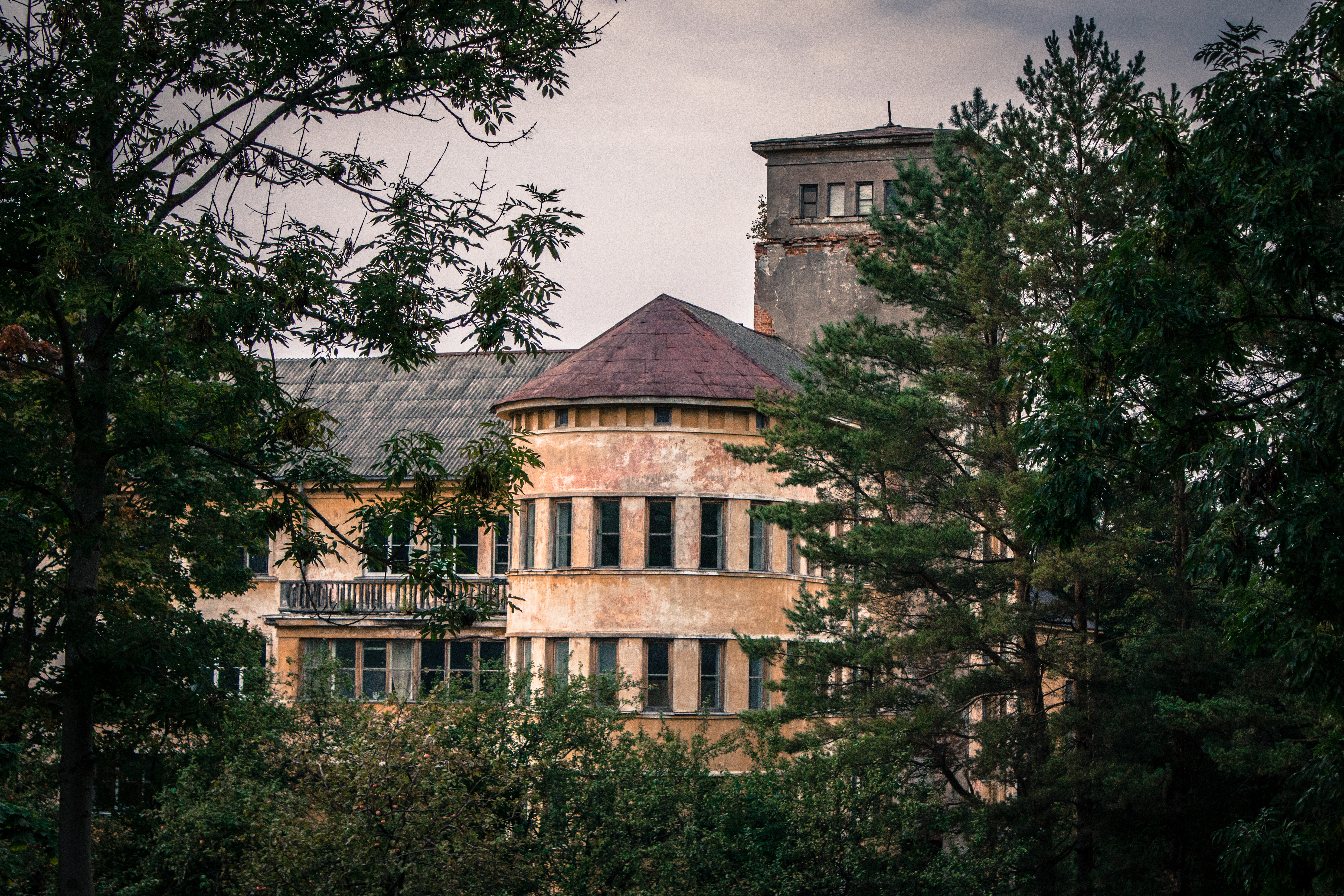 Kohtla-Järve koolihoone, 1938-1939